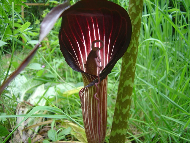 Arisaema speciosum au Jardin Jungle